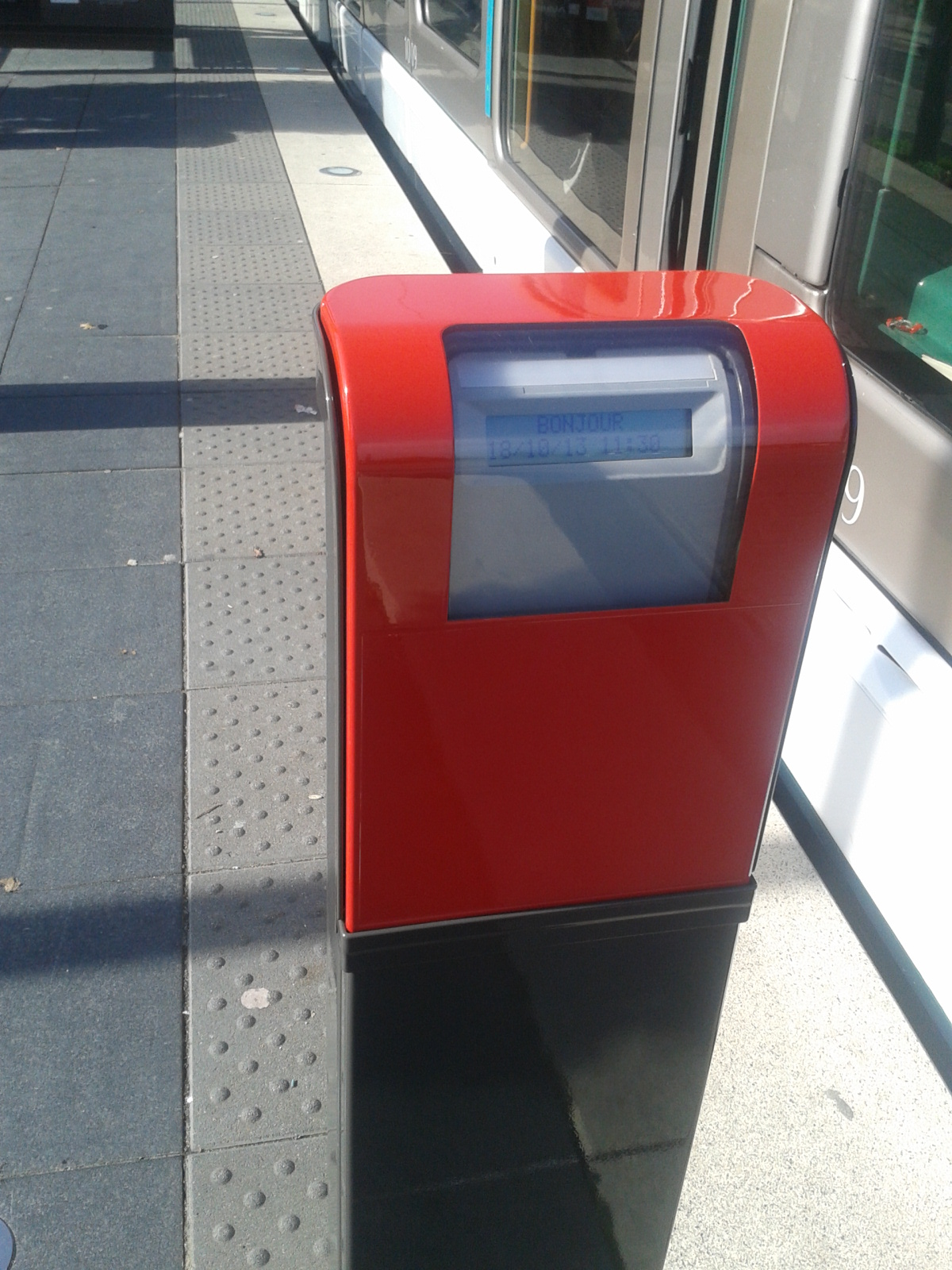 Un valideur de Badgéo nouvelle génération, installé depuis 2013 à la station Etoile Polygone du tramway de Strasbourg, le 18 octobre 2013